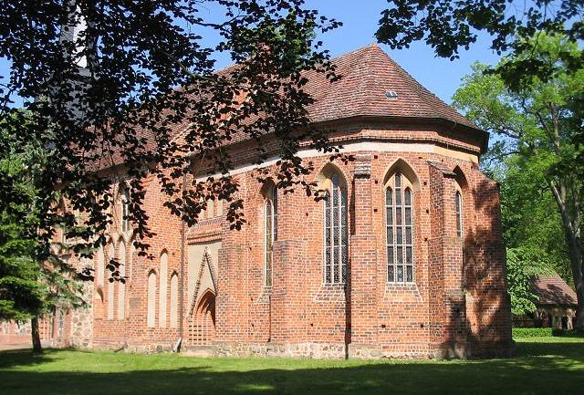 Kloster/Stift Marienfließ, Prignitz, Brandenburg. Klosterkirche.